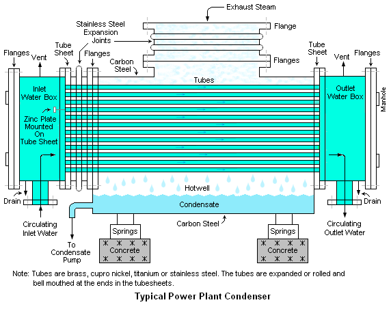 Condenser for steam turbine diagram